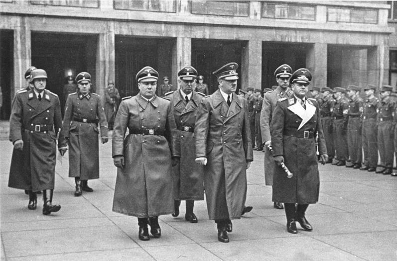 Berlin, Beisetzung Oberst Werner Mölders Zentralbild Staatsbegräbnis für den am 22.11.1941 bei Breslau abgestürzten Inspekteur der Jagdflieger, Oberst Werner Mölders, am 28.11.1941 in Berlin. UBz: nach der Trauerfeier im Reichsluftfahrt-Ministerium verlassen (von rechts) Generalfeldmarschall Erhard Milch, Hitlers Begleitarzt SS-Sturmbannführer Dr. Karl Brandt, Adolf Hitler, Hitlers Adjutant SS-Gruppenführer Julius Schaub und Reichsminister und Chef der Reichskanzlei SS-Obergruppenführer Martin Bormann den Ehrenhof des RLM. 1941 Abgebildete Personen: Milch, Erhard: Generalfeldmarschall, Ritterkreuz (RK), Luftwaffe, Deutschland (GND 118582402) Brandt, Karl Dr. med.: SS, 1947 Todesurteil im Nürnberger Ärzteprozeß, Deutschland (GND 118659839) Hitler, Adolf: Reichskanzler, Deutschland Schaub, Julius: SS-Gruppenführer, persönlicher Adjutant Adolf Hitlers, Deutschland Bormann, Martin: SA, NSDAP, Leiter der Parteikanzlei, Sekretär Hitlers, Deutschland